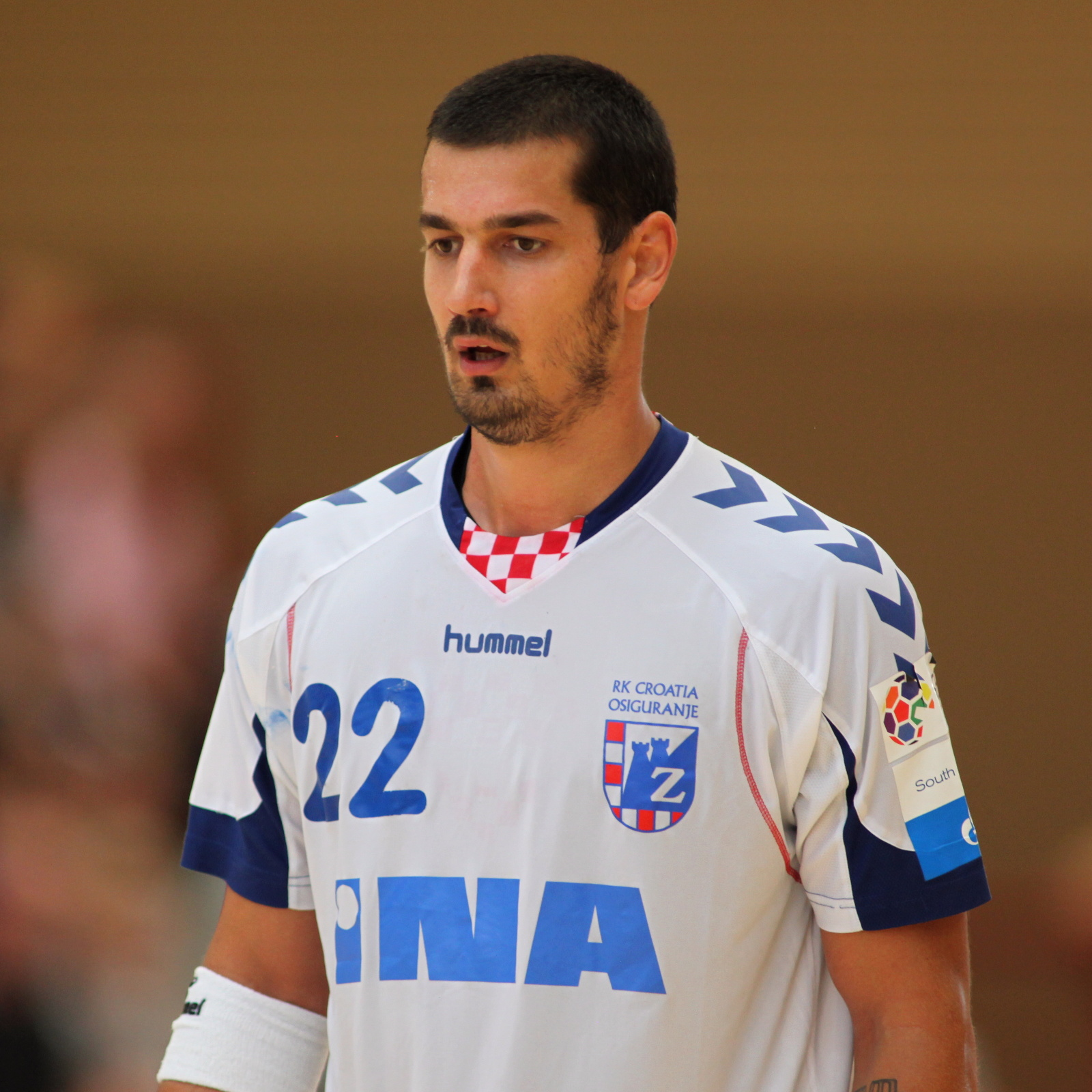 Josip Valčić, Handballspieler bei RK Zagreb am 16. August 2014 beim Sparkassen-Cup in Ehingen.